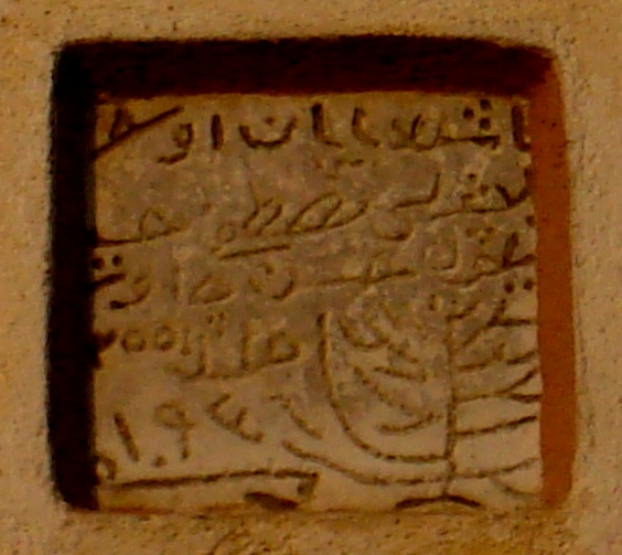 Плоча, вградена в джамията в село Кочан. На нея е изписано името "Мустафа Малик" (Владетел Мустафа). Текстът не може да бъде разчетен напълно, тъй като това е само фрагмент от плочата.